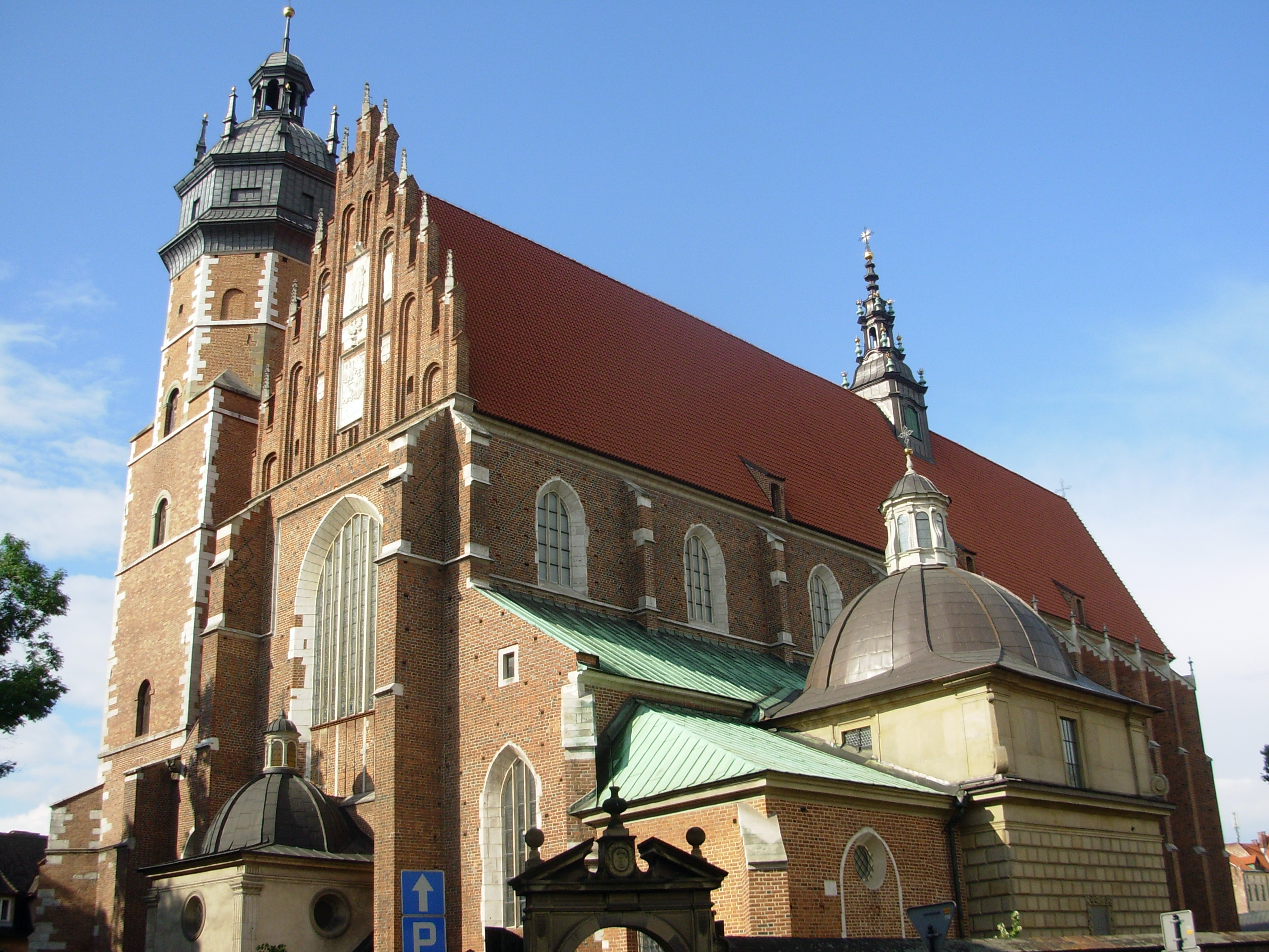 Kazimierz, Kraków, Poland